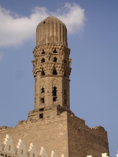 Al-Hakim Mosque in Cairo